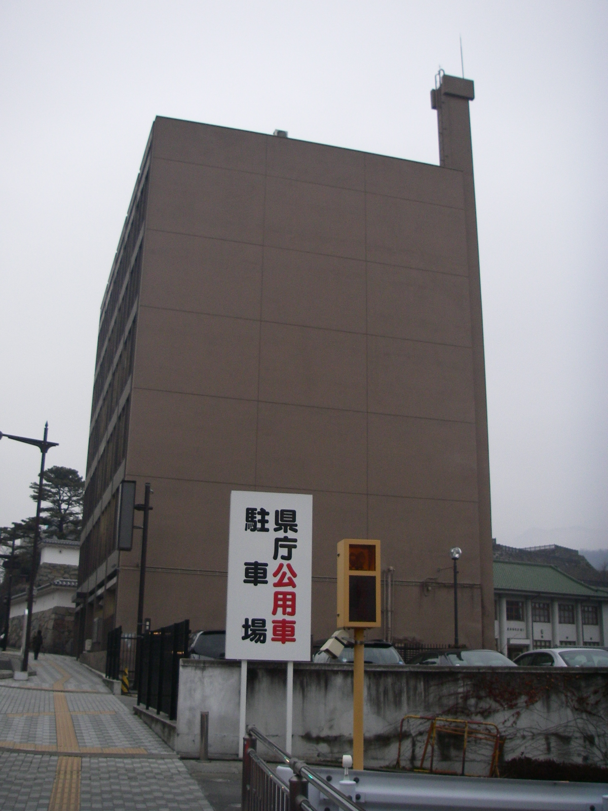 山梨県庁東別館